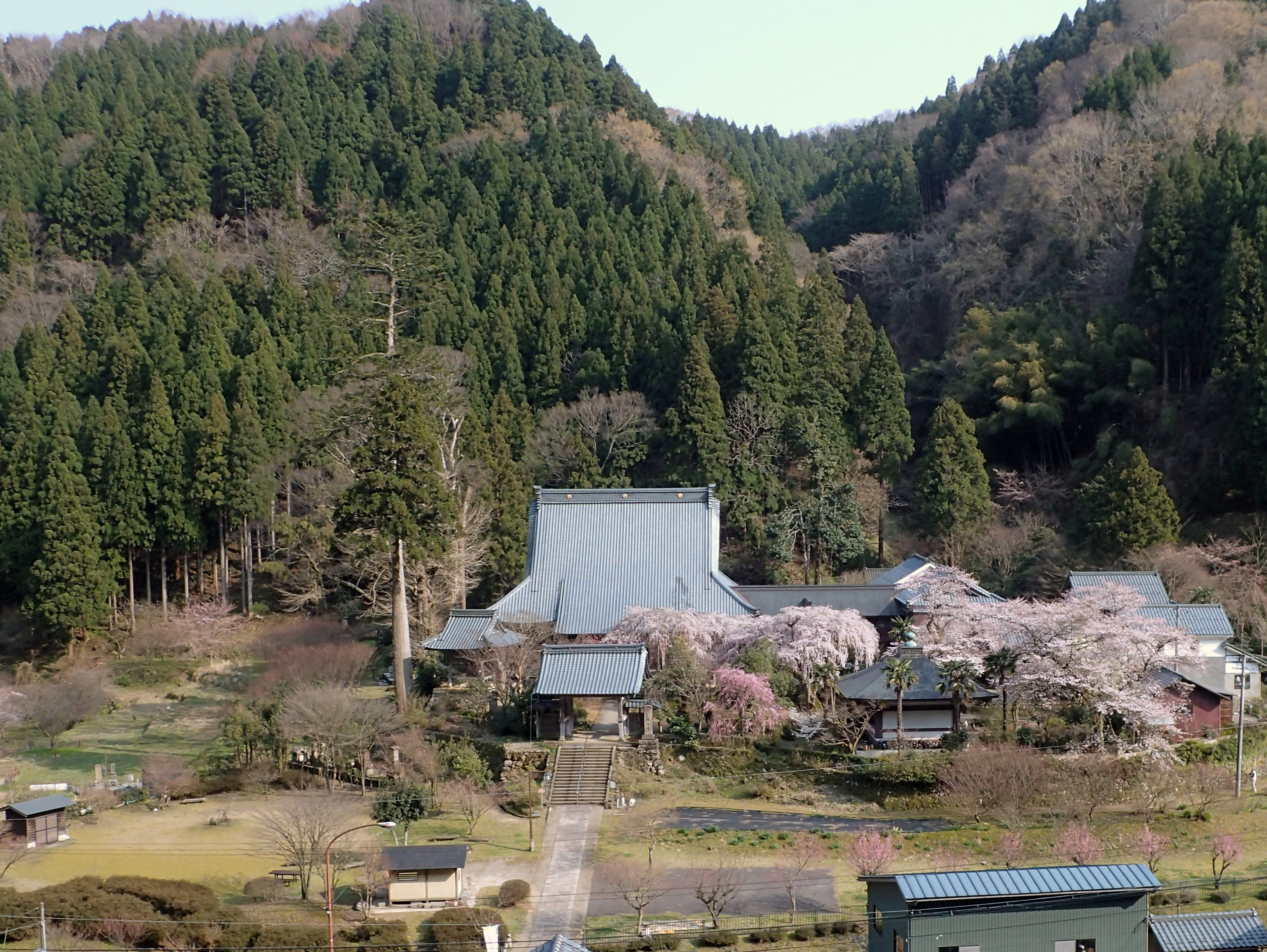 しだれ桜が満開の頃の全景です